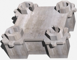 Flakturm Bauart 1